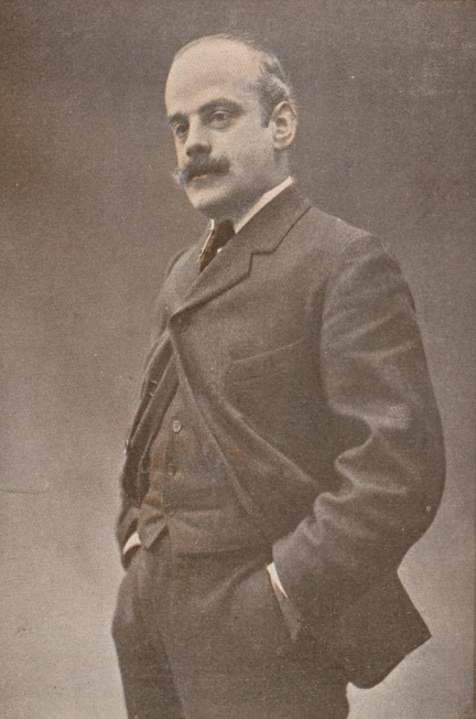 Antonio M. Viergol; fotografía de Franzen